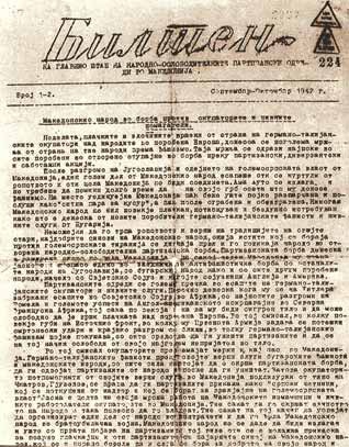 Вестник "Билтен"